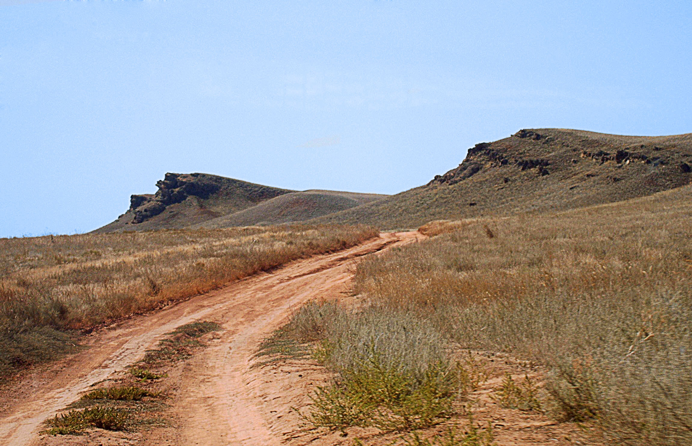 гора Богдо, Ахтубинский район